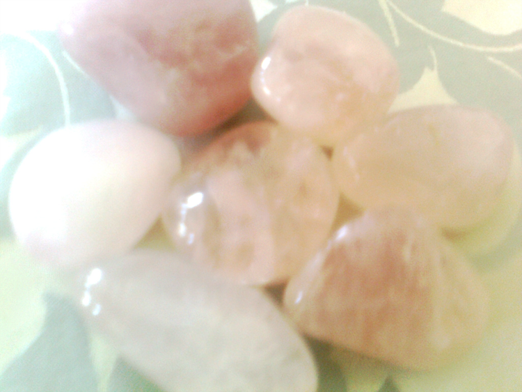 Rosenquarz, große polierte Steine. Kann man fast in jedem Edelstein-Geschäft erhalten